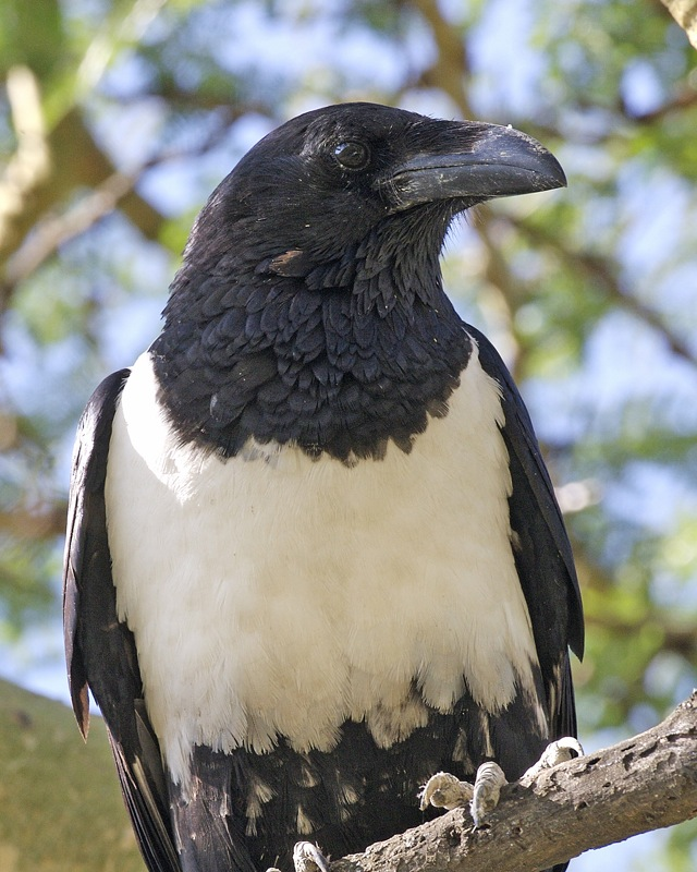 Pied Crow (Corvus albus). Nakuru, Kenya, 31 August 2008